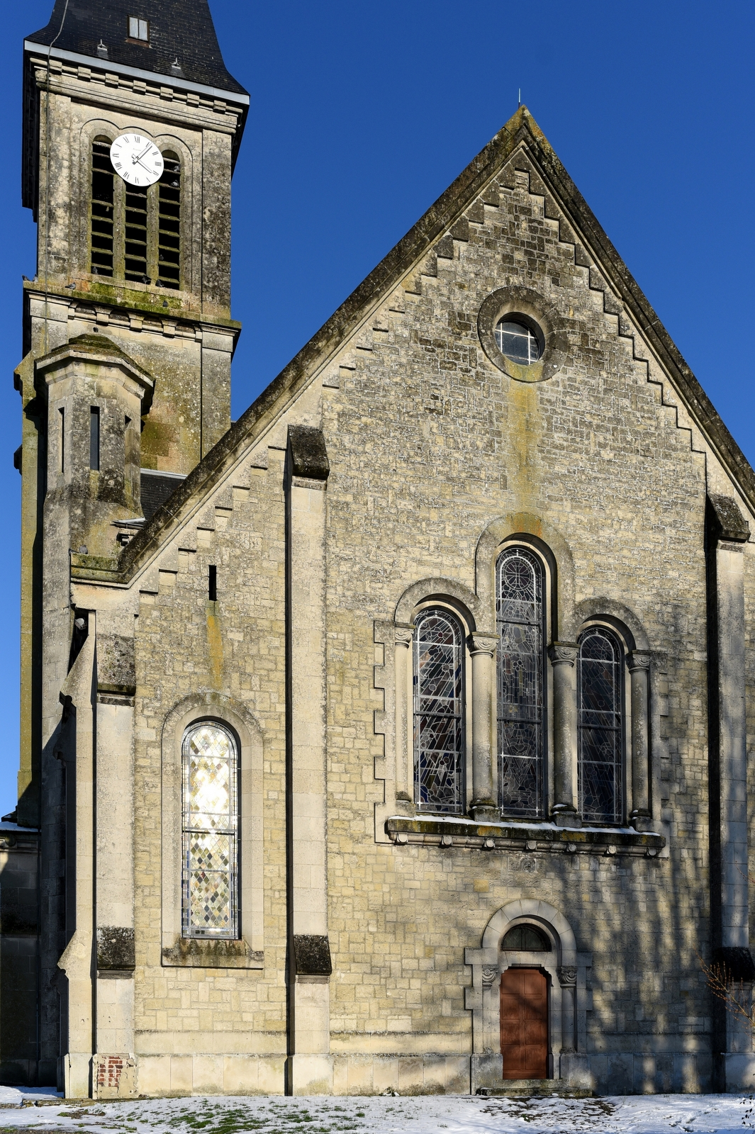 Eglise